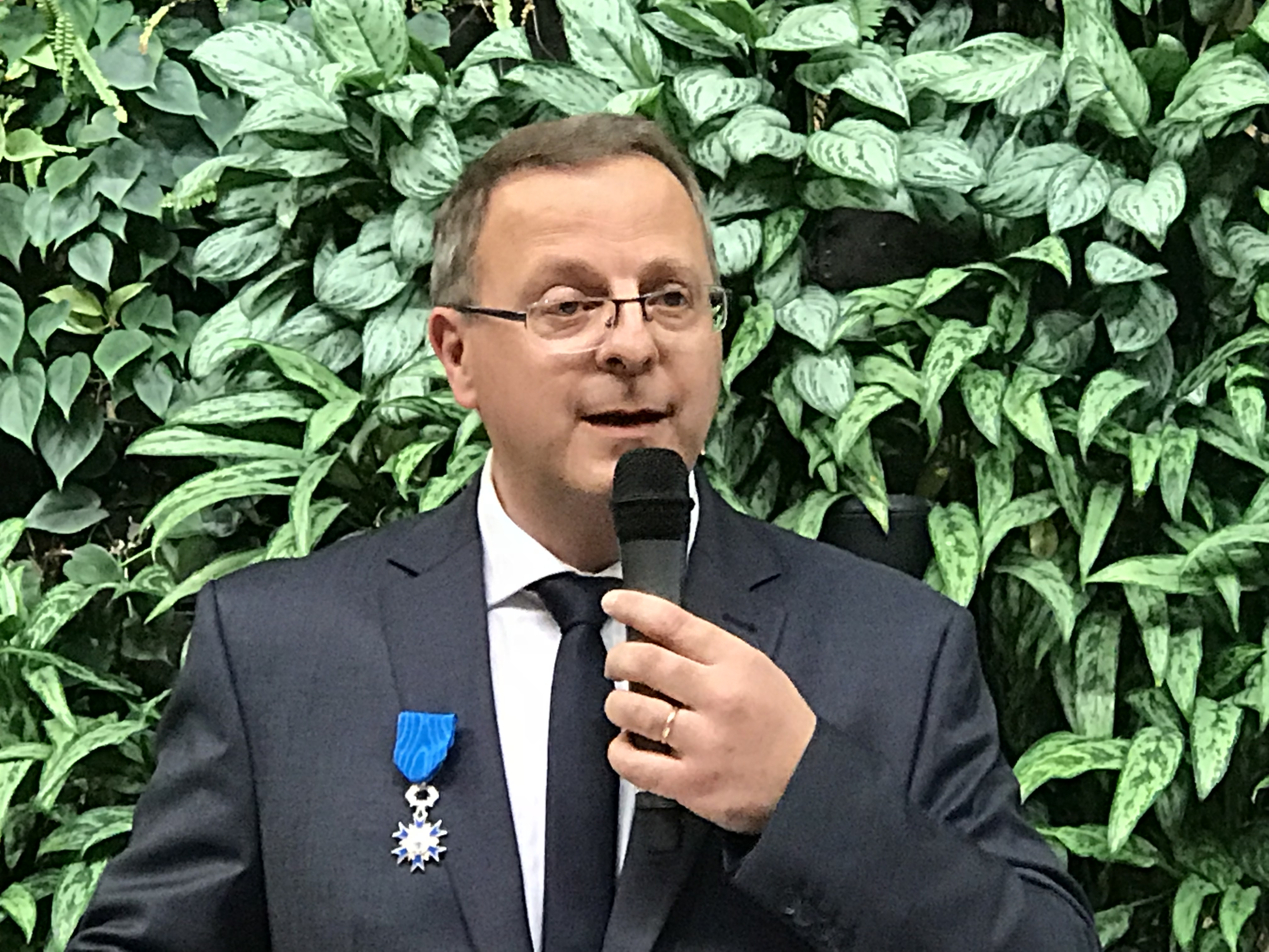 Docteur en biologie marine et PDG d'Hemarina